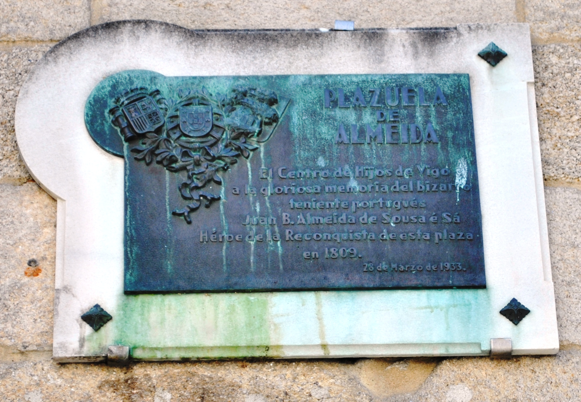 Véxase o título e as categorías.